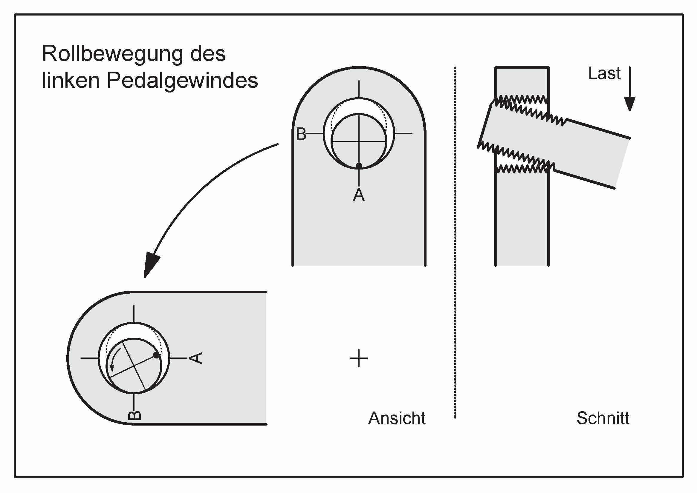 Schematische Darstellung der Rollbewegung des linken Pedalgewindes im Kurbelarm. Die Taumelbewegung resultiert aus der stets senkrechten Belastung des Pedals. Ein linksdrehendes Gewinde verhindet beim linken Pedal das Herausdrehen.